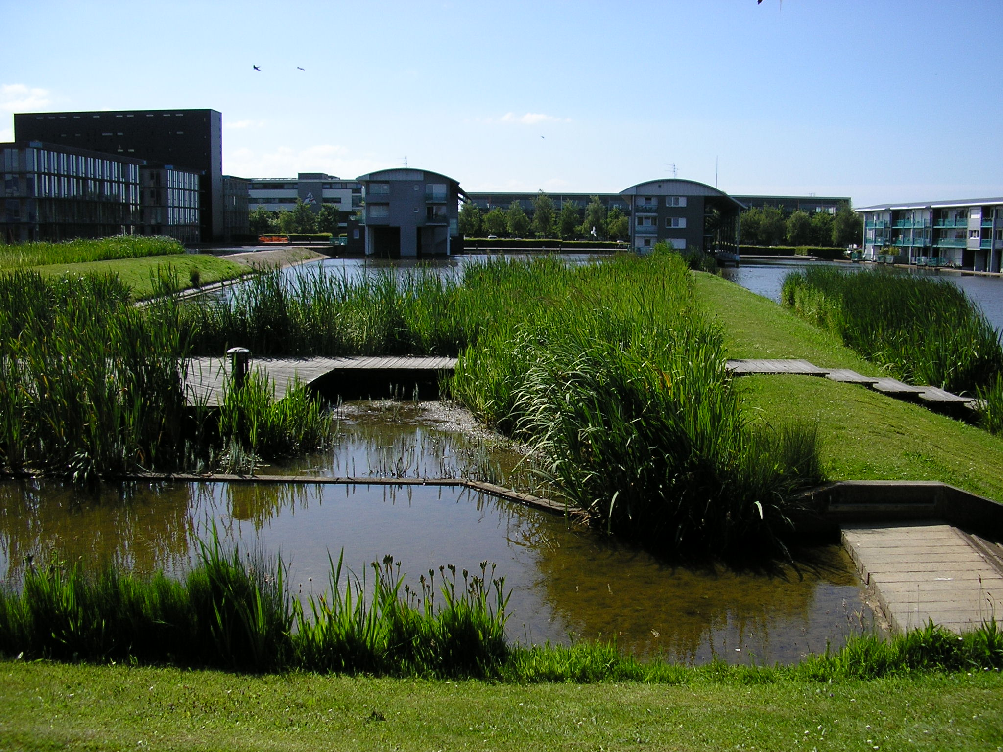 vue du CITIS à Hérouville St Clair